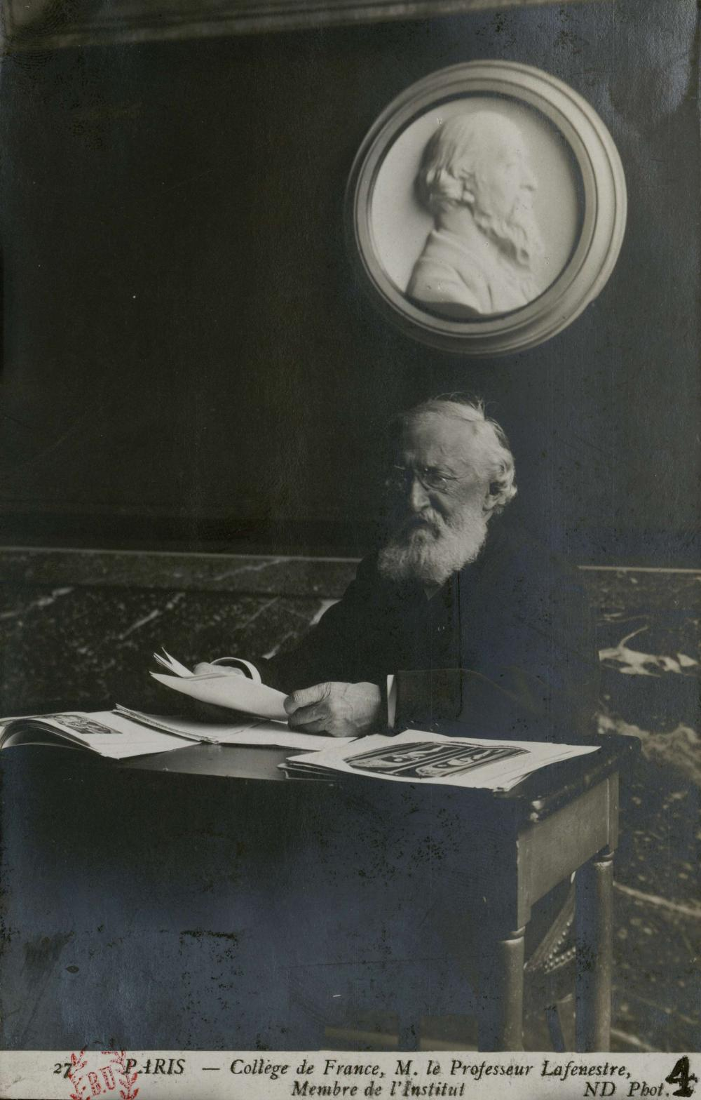 Carte postale